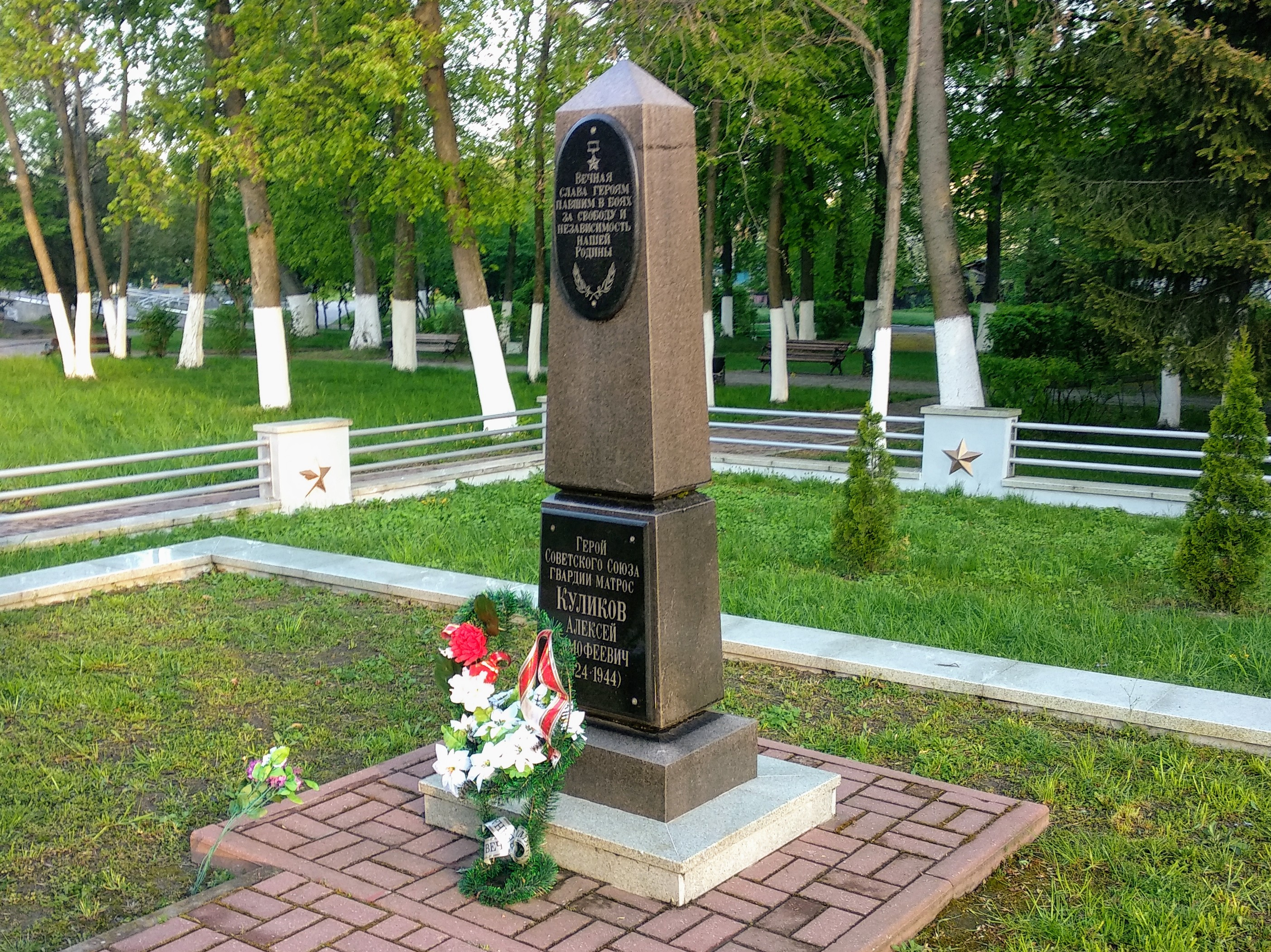 Pinsk , Belarus